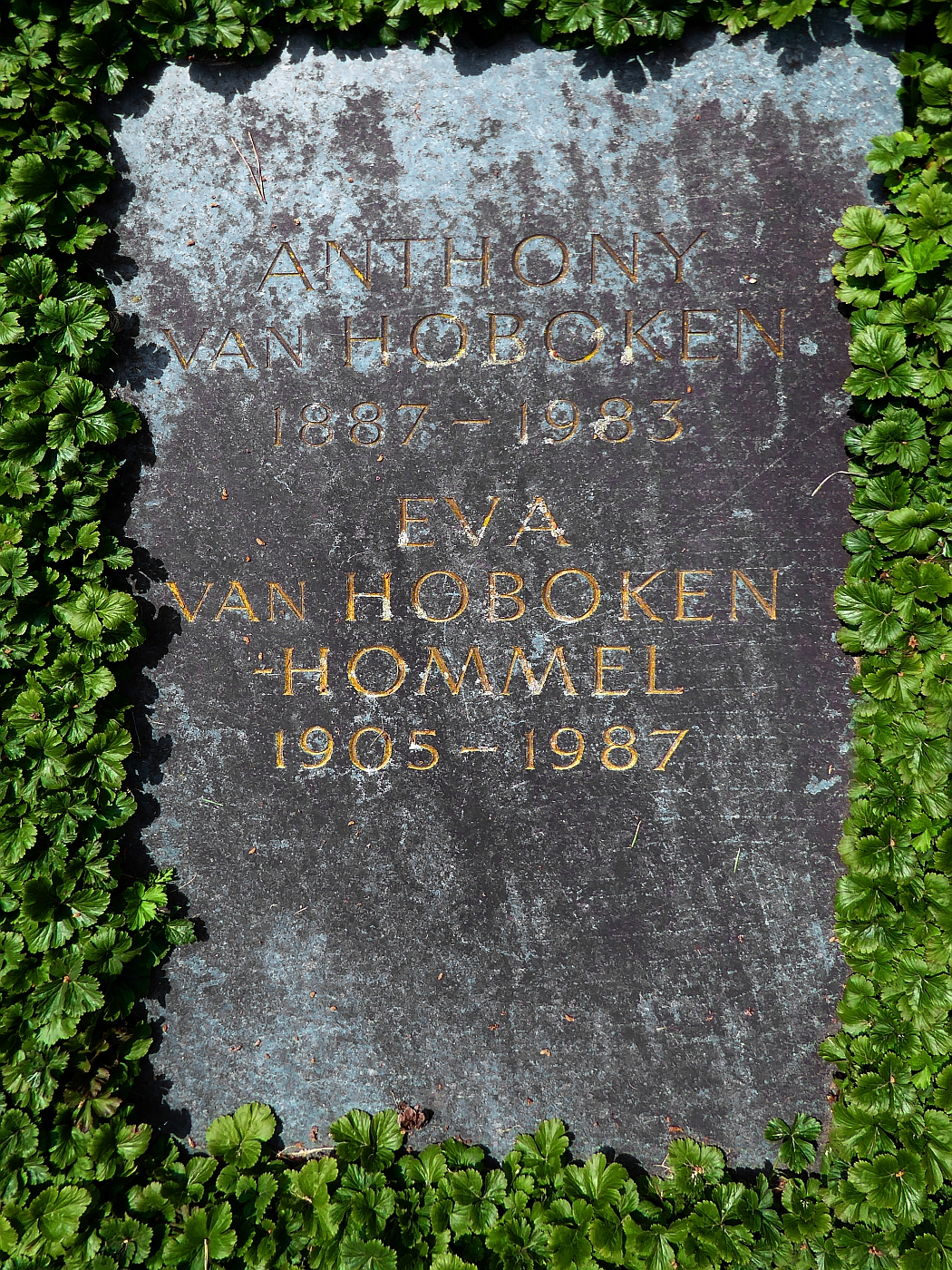 Grab von Anthony van Hoboken (1887–1983; Musikwissenschaftler) und seiner Frau Eva (1905–1987; Schriftstellerin) auf dem Friedhof Witikon in Zürich